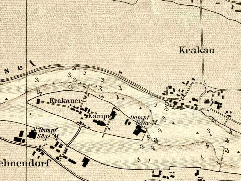 Danzig Krakau.